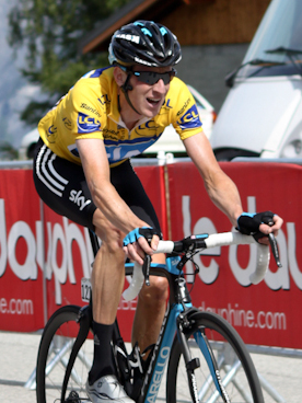 Bradley Wiggins, 2011 Critérium du Dauphiné, Stage 7.